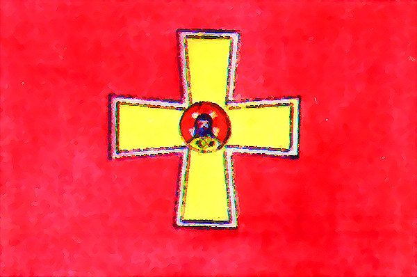 Прапор Ізюмського козацького полку